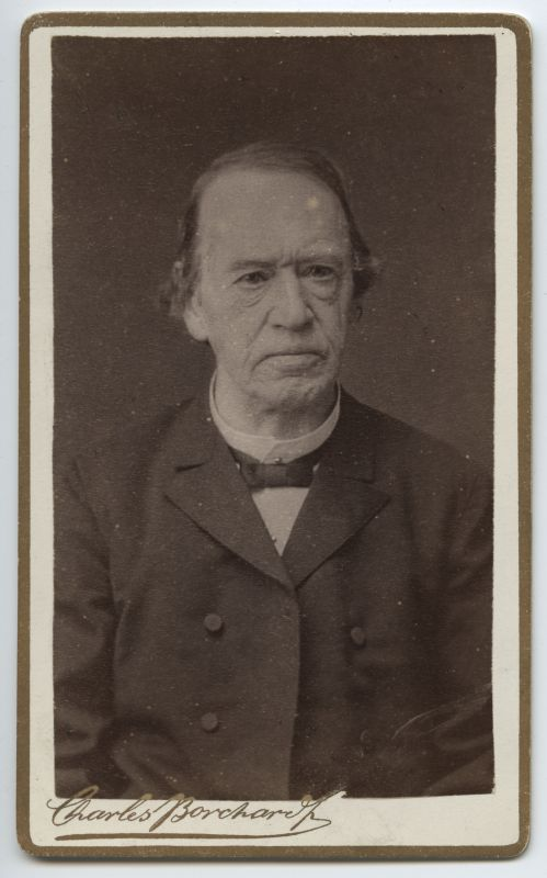 Portree: Heinrich Ferdinand Hoffmann, Koeru koguduse õpetaja 1846–1891, Järva praostkonna praost 1875–1891